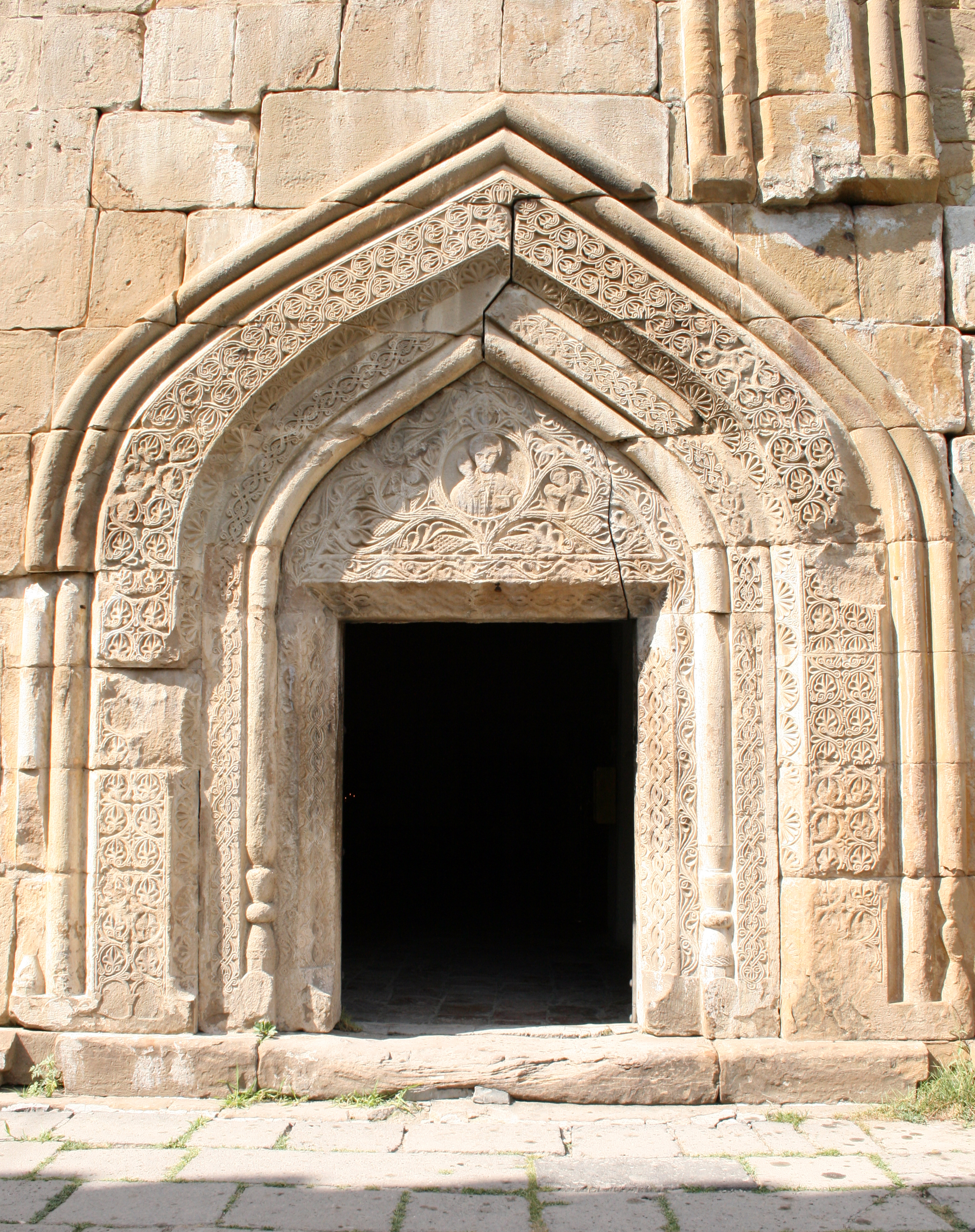 ანანურის მთავარი ტაძრის ჭიშკარი